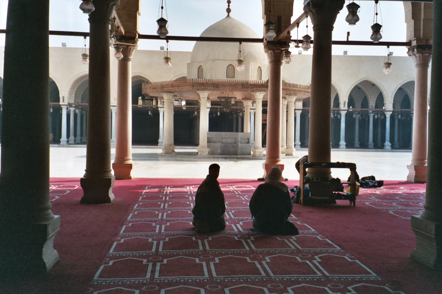 Cours de la mosquée Amr Ibn al-`As au Caire. Première construction en 641. Détruite plusieurs fois la dernière reconstruction complète date de 1845 parMohammed Ali Pasha.